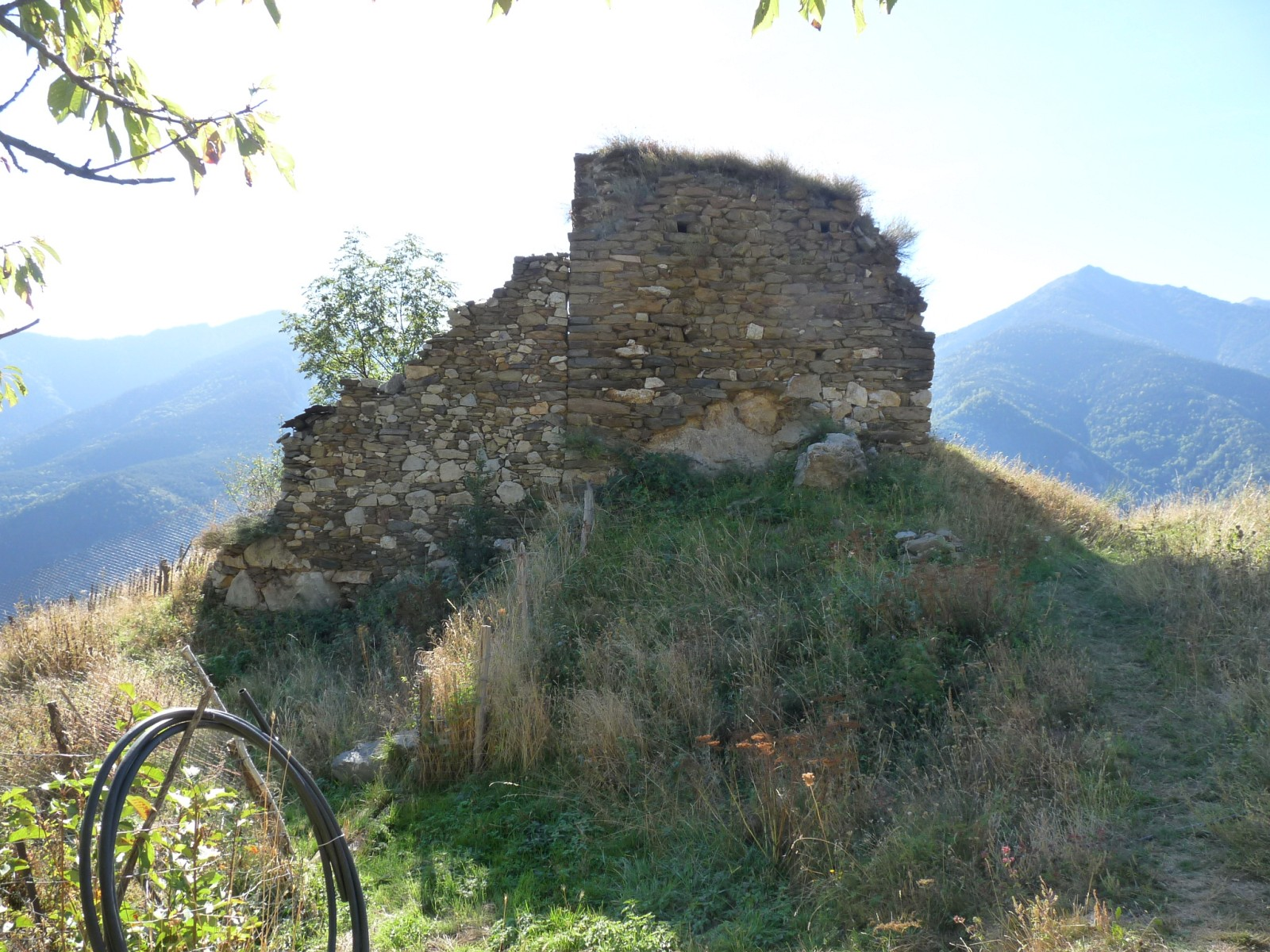 Vieille tour de Llar (vue du nord), Pyrénées-Orientales, France